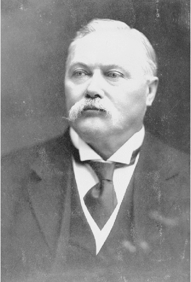 John Hendry